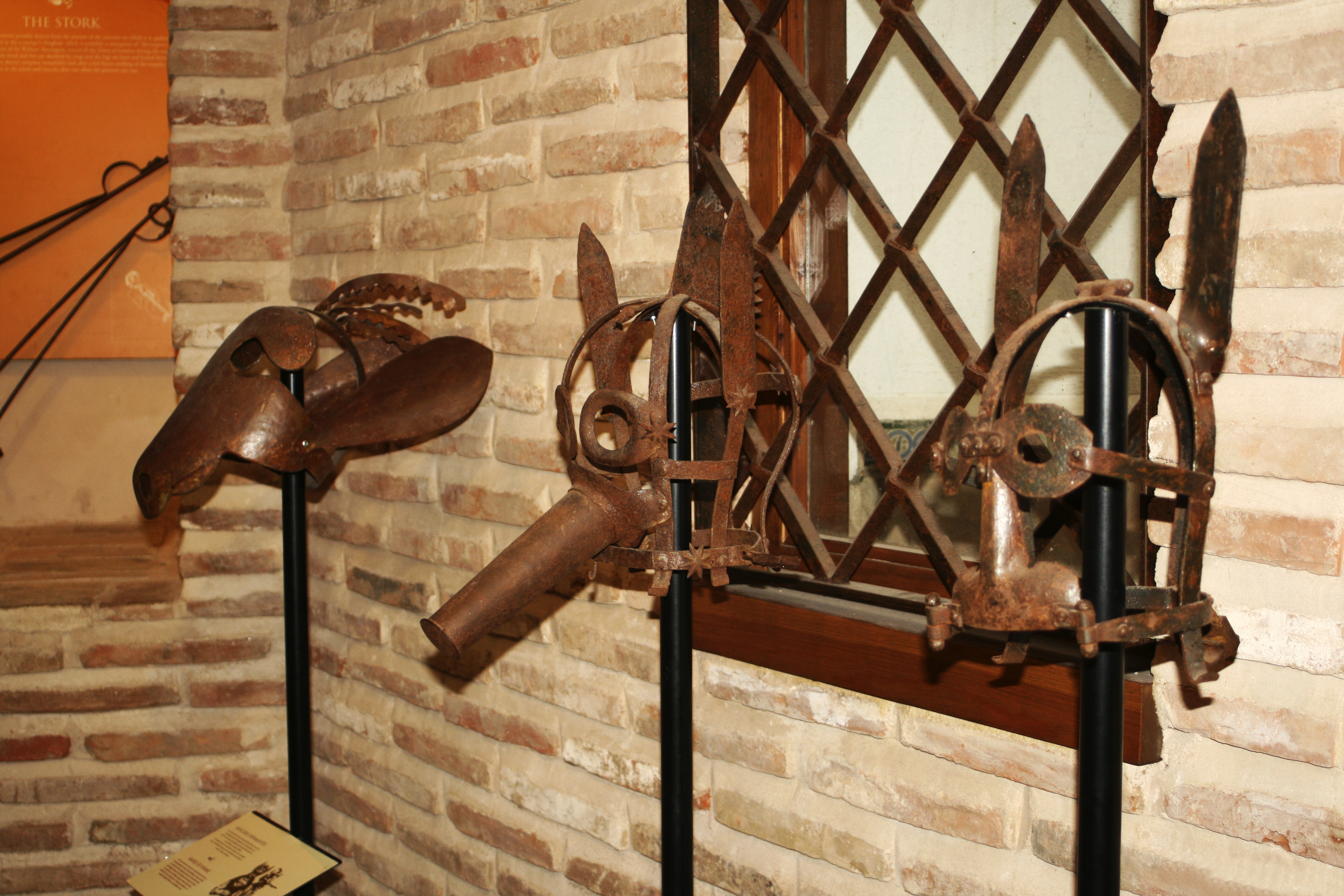 Mascaras infames 2 tortura